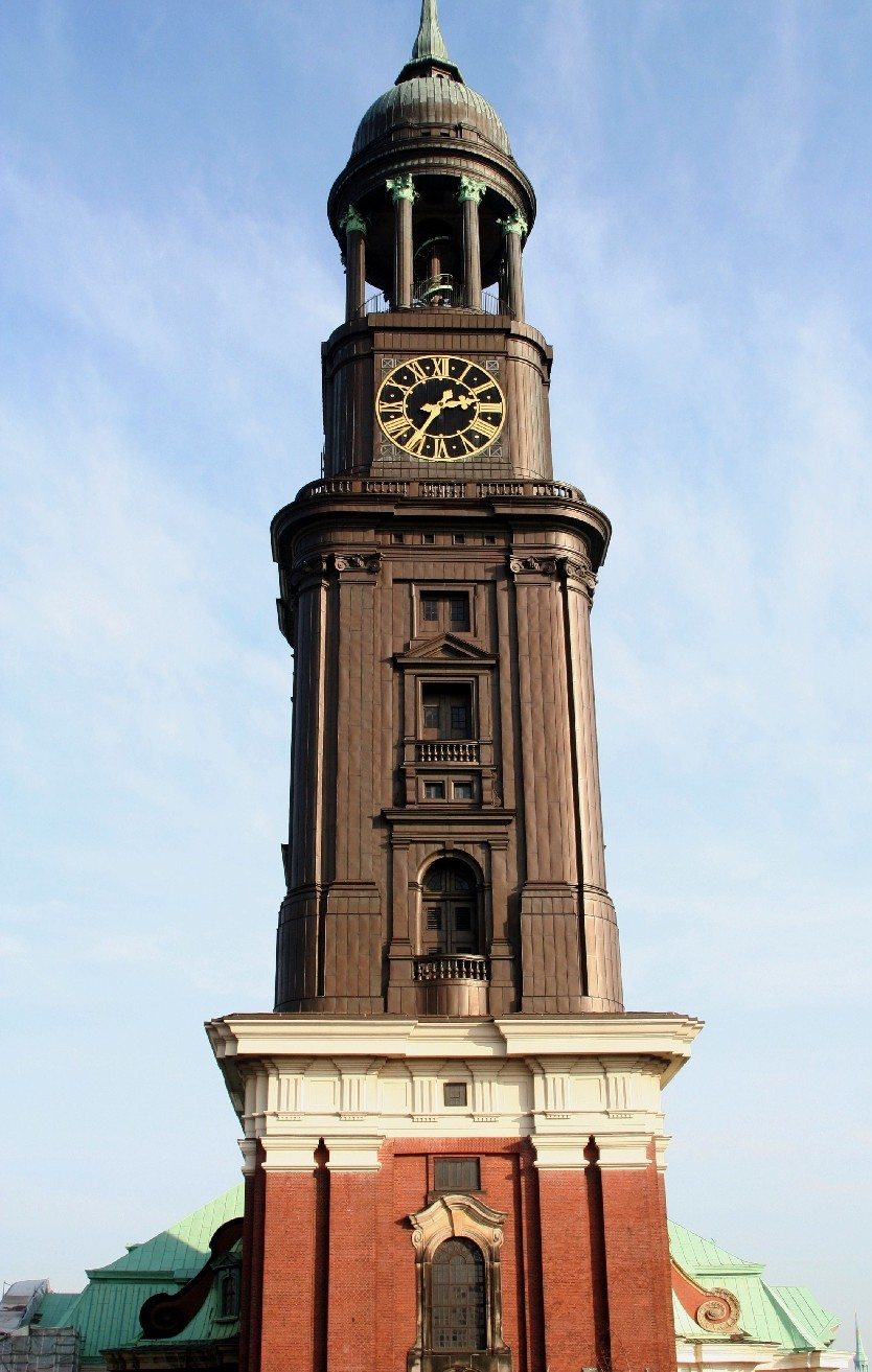 Turm von St. Michaelis in der Hamburger Neustadt.